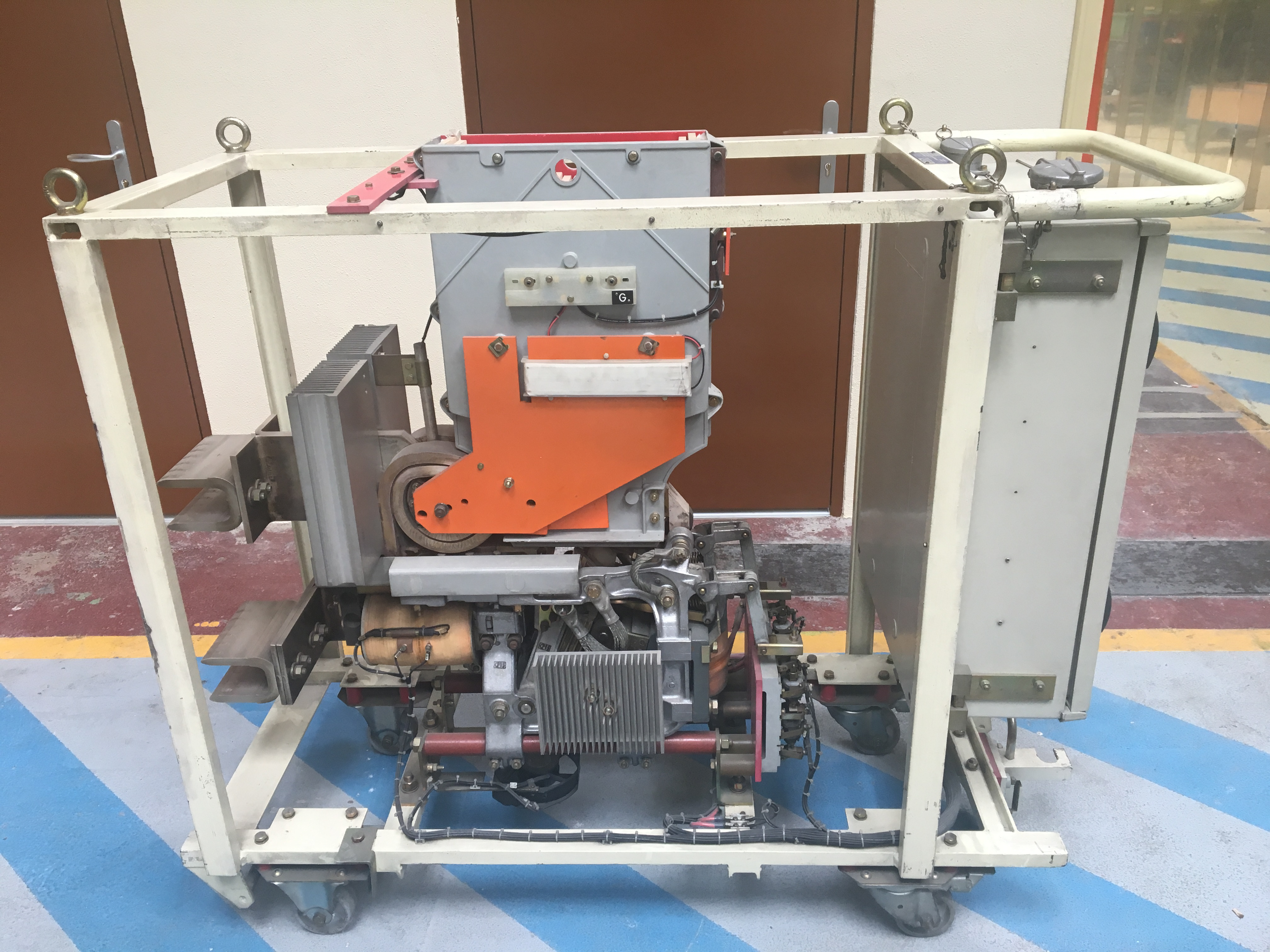 Un disjoncteur ultra rapide pour courant continu pour alimenter les rails du métro, constructeur « EMC traction », intensité permanente 6000 A, gamme de réglage de déclenche en surintensité : 9000 A à 18000 A. Intensité de déclenchement dynamique 10 kA de plus que l'intensité normale avant le court-circuit pour une pente de 32 kA/s. Bitensions commutable sur la boite à arc: 750 V ou 1500 V.